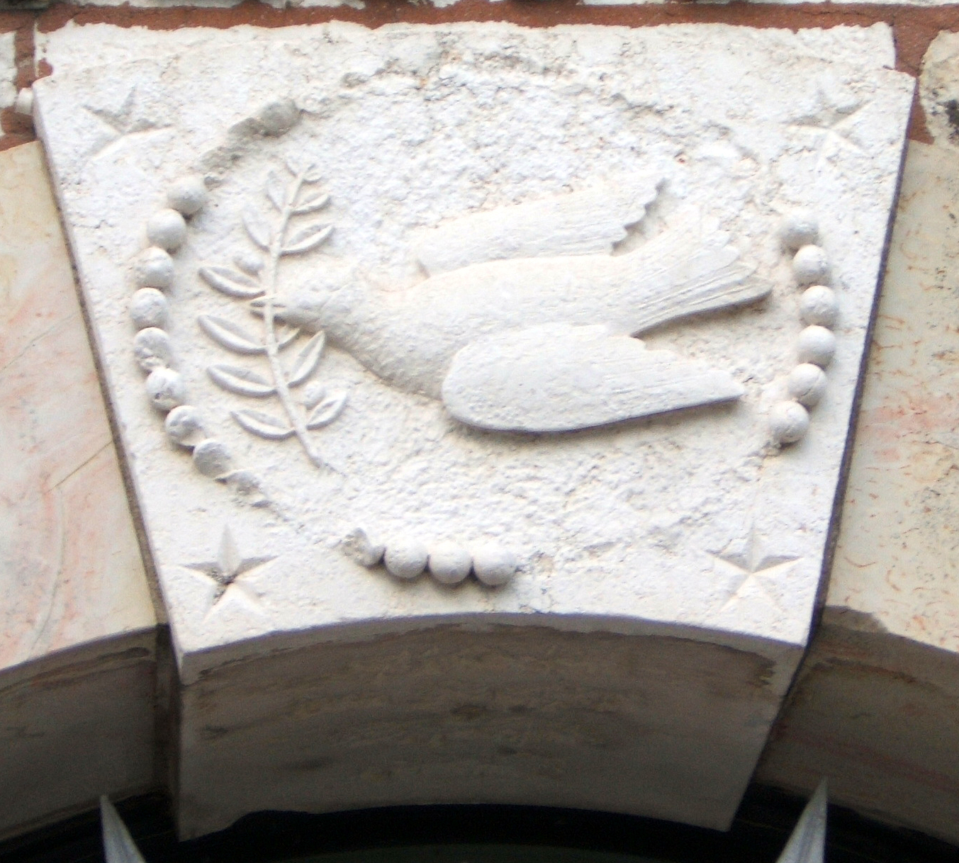 German Hospital, Jerusalem